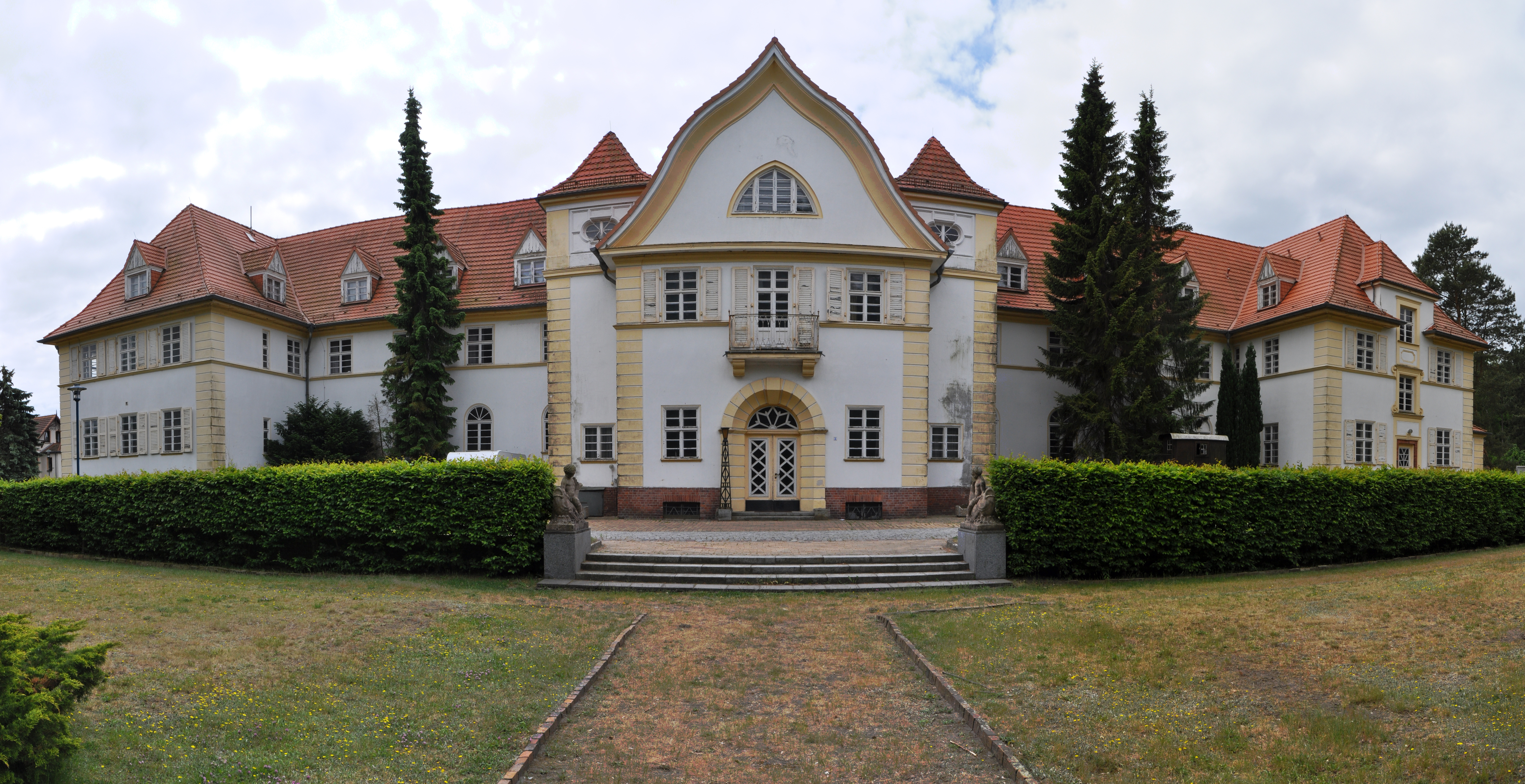 historic building in Graal-Müritz, Rostocker Straße 1